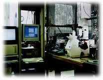 Foto eines klassischen Patch Clamp Setups mit schwingungsgedämpftem Tisch und Mikroskop.